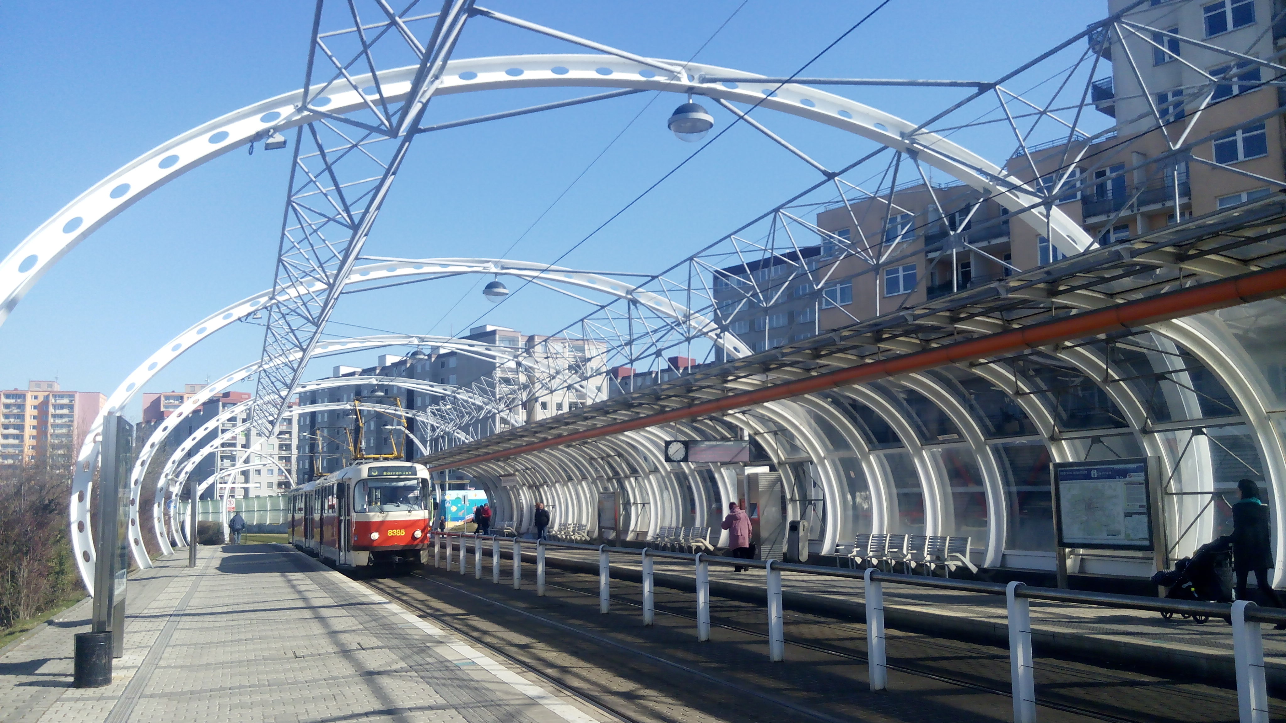 Tramvajový vůz typu T3 ve stanici Sídliště Barrandov